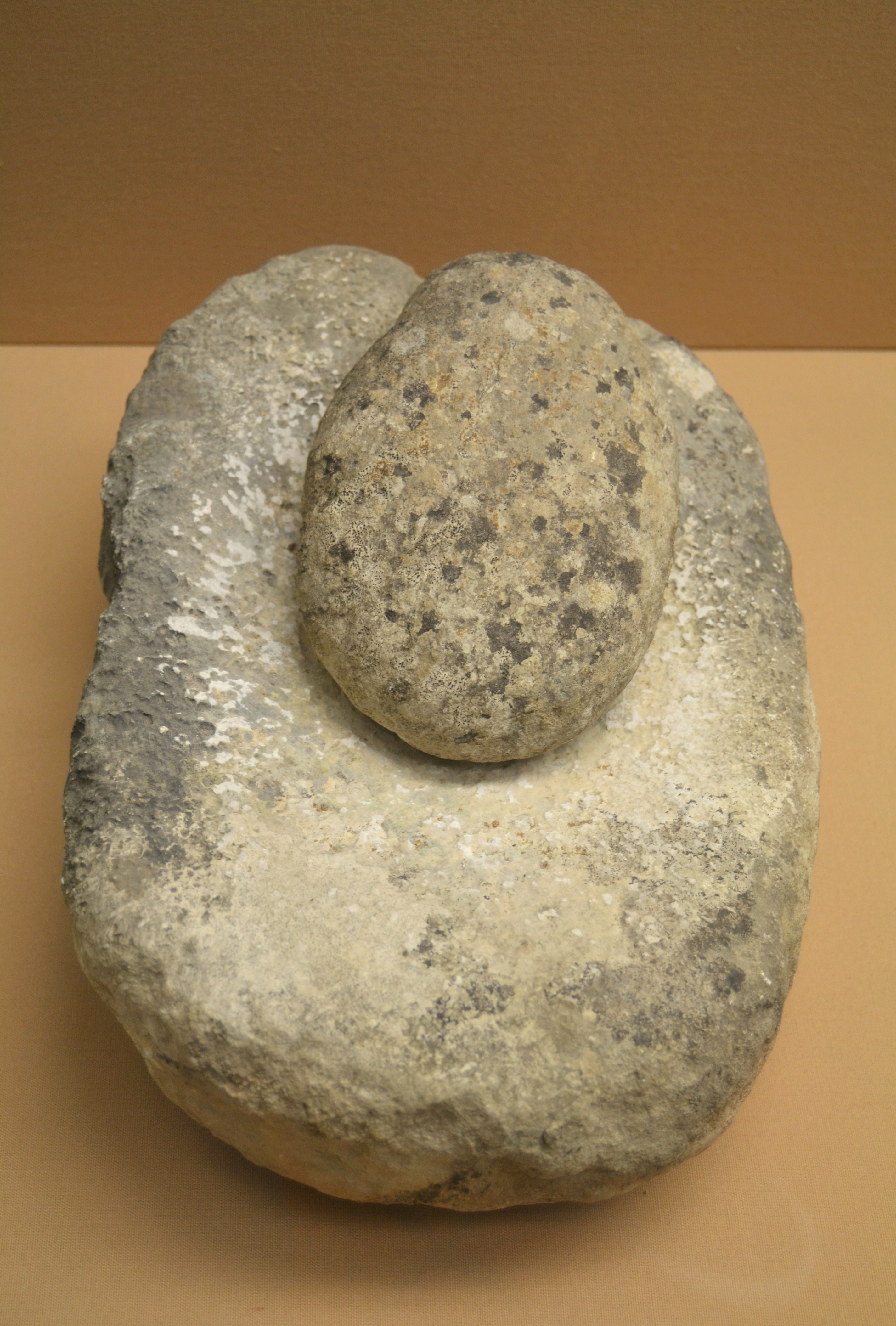 Molí barquiforme i mola (Cavall Bernat, Oliva). Museu Arqueològic d'Oliva.